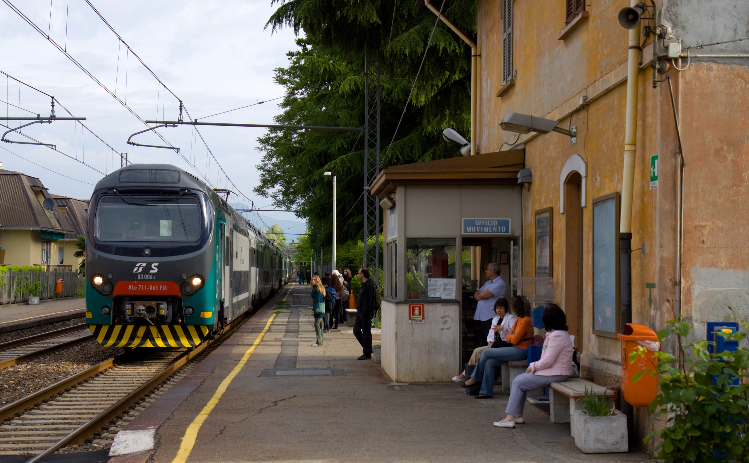 Treno suburbano della linea S5 in arrivo nella stazione di Castronno